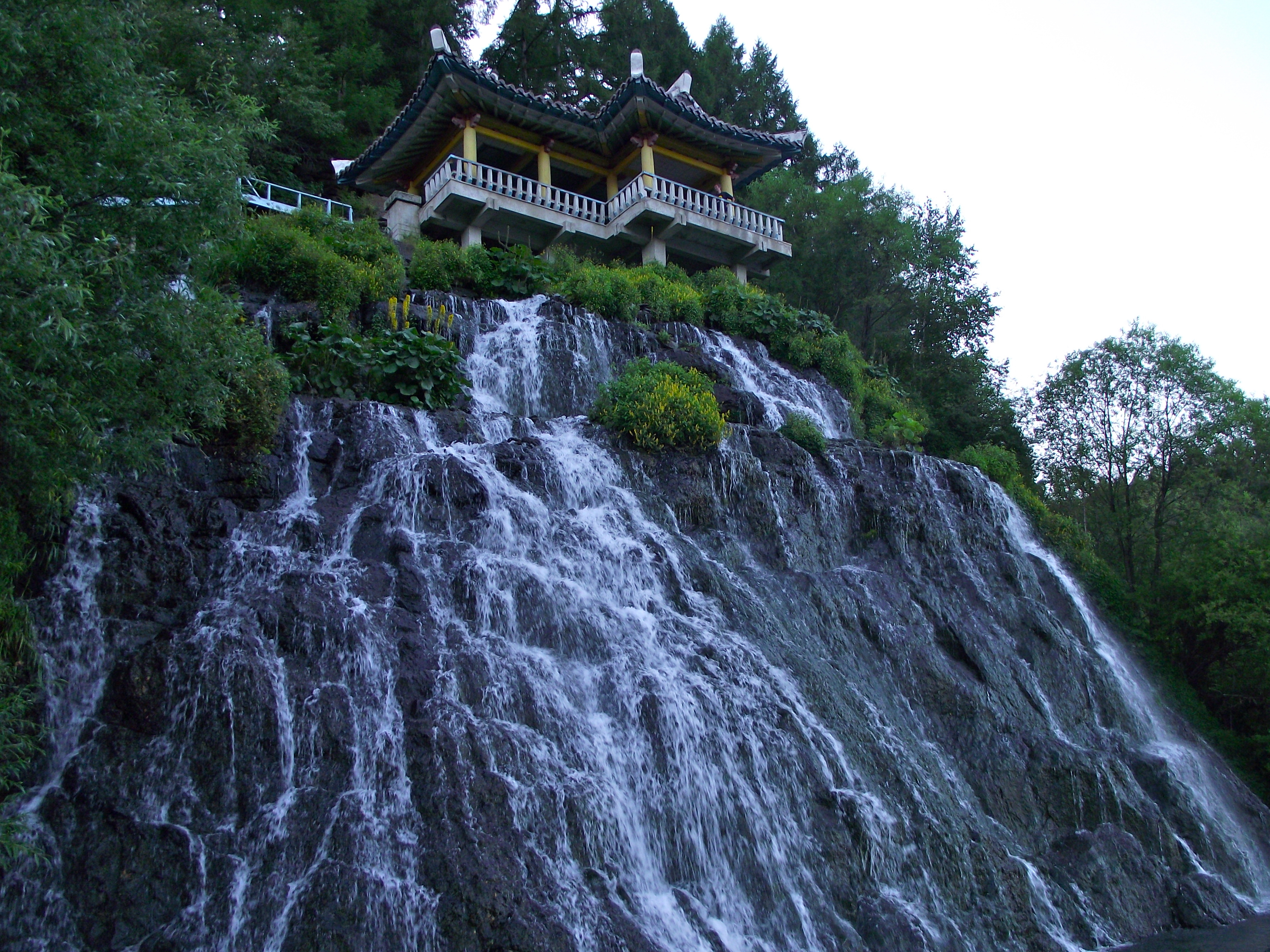 Rimyongsu Falls